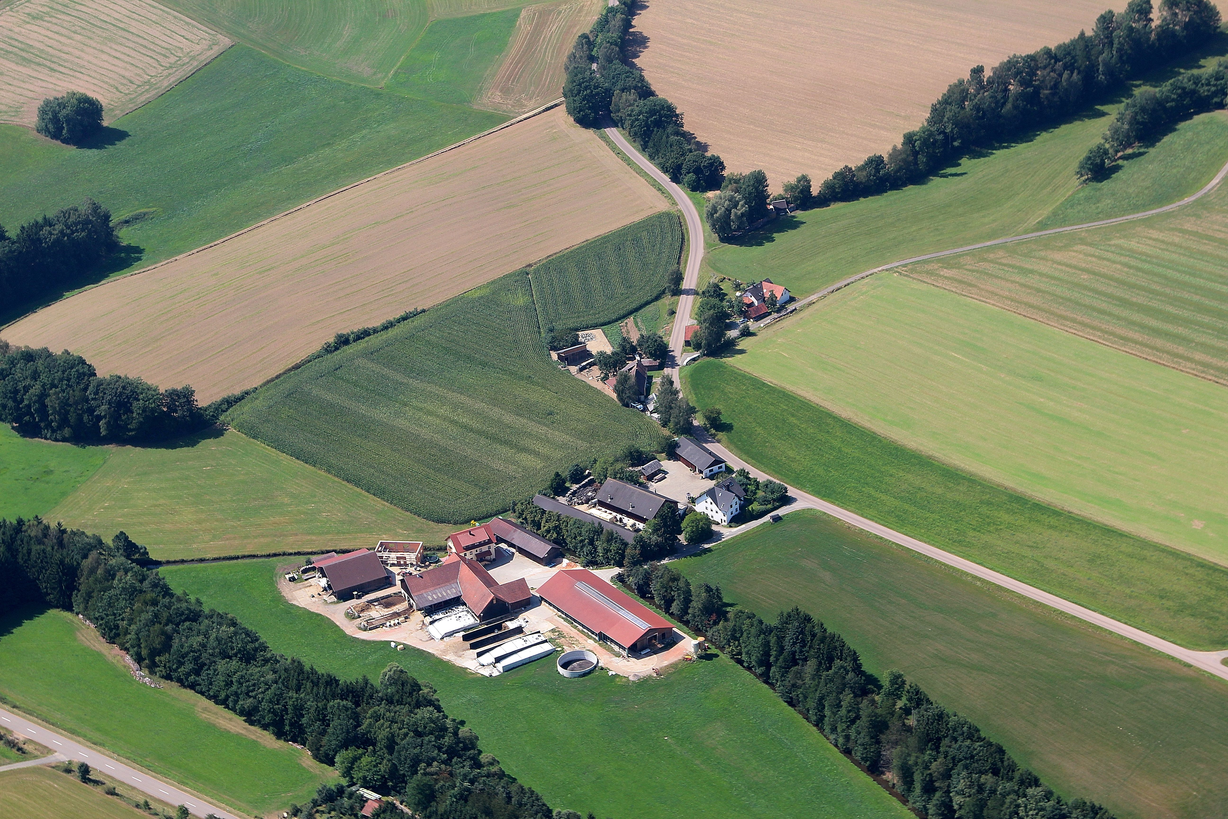 Reichertsmühle ist ein Ortsteil in der Gemeinde Niedermurach, Landkreis Schwandorf, Oberpfalz, Bayern